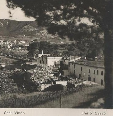 Masia Cal Vidu